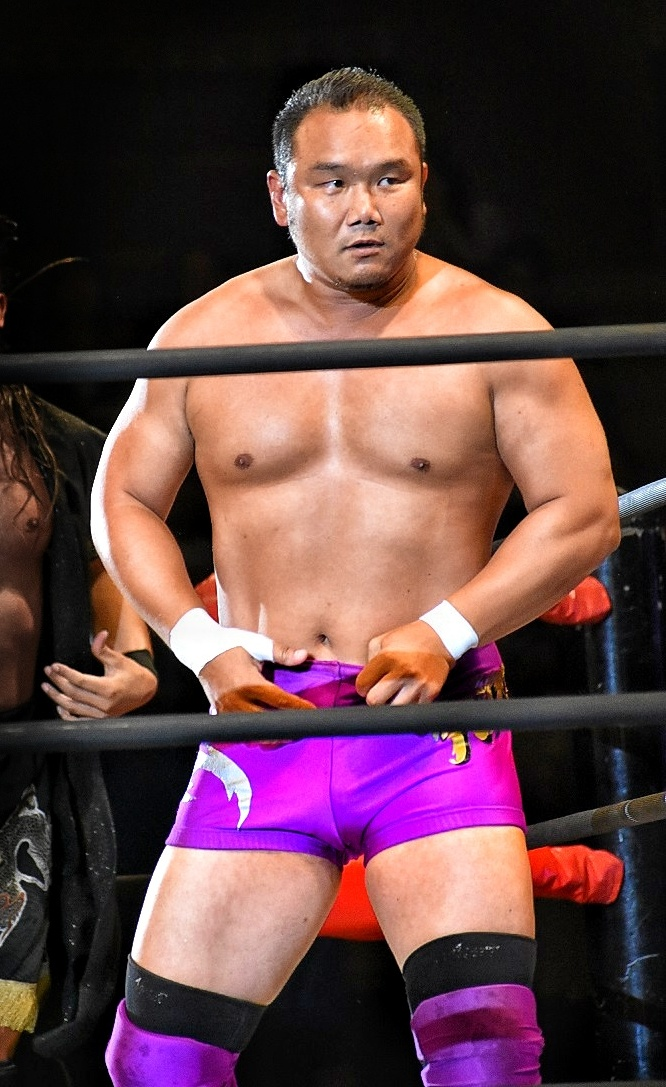 プロレスラーの土方隆司